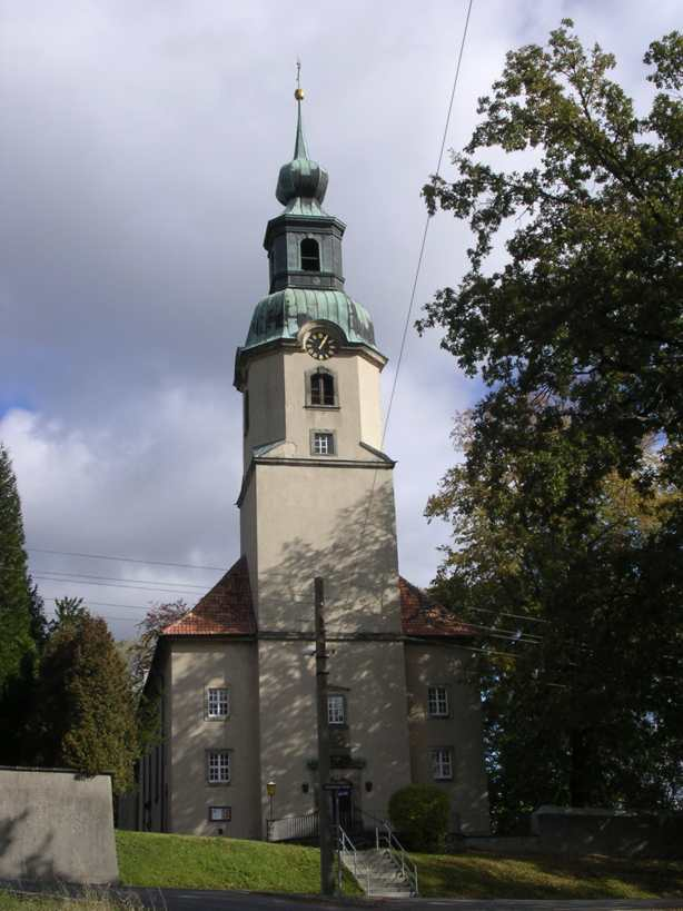 Kirche in Großröhrsdorf (Sachsen)